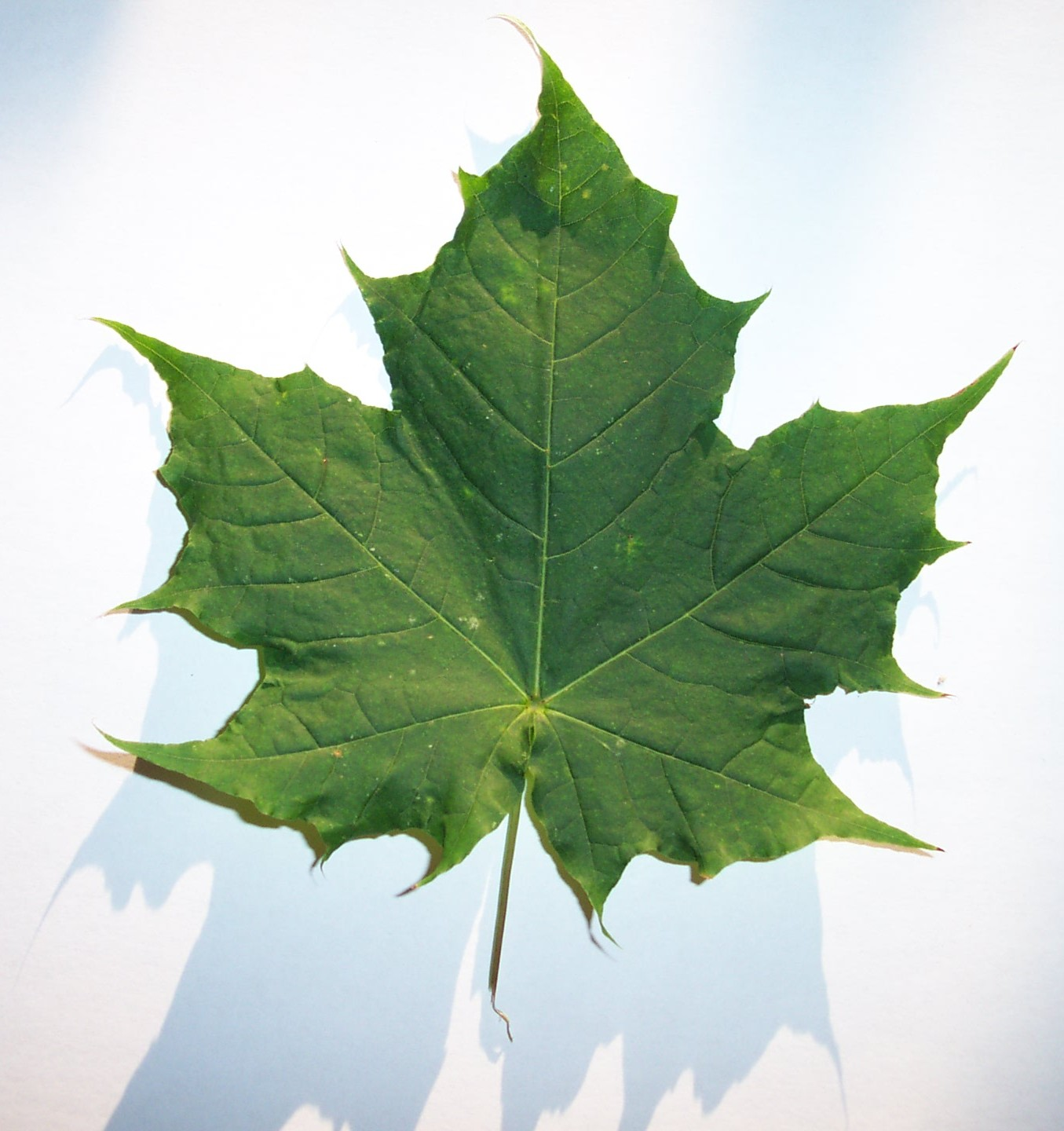 érable (acer)